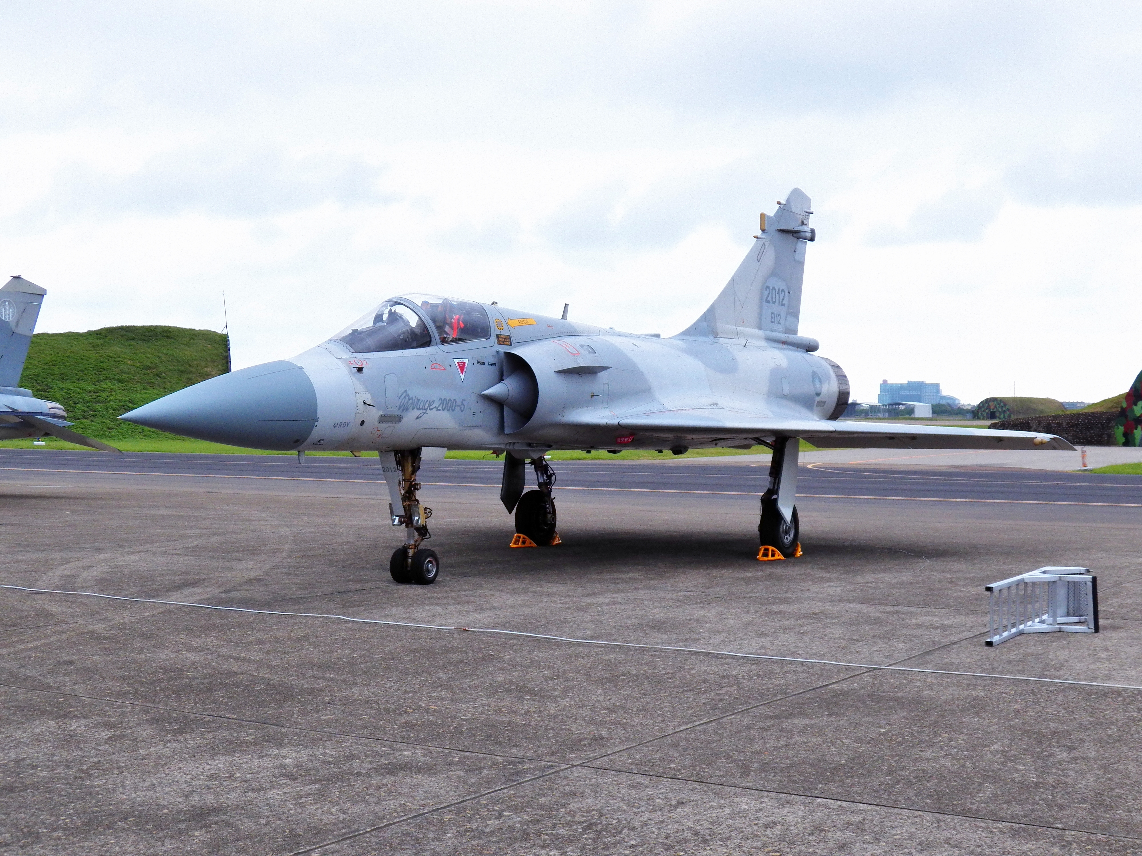 2012年空軍新竹基地營區開放活動，性能展示飛行後，於停機坪公開展示的幻象2000-5EI 2012。